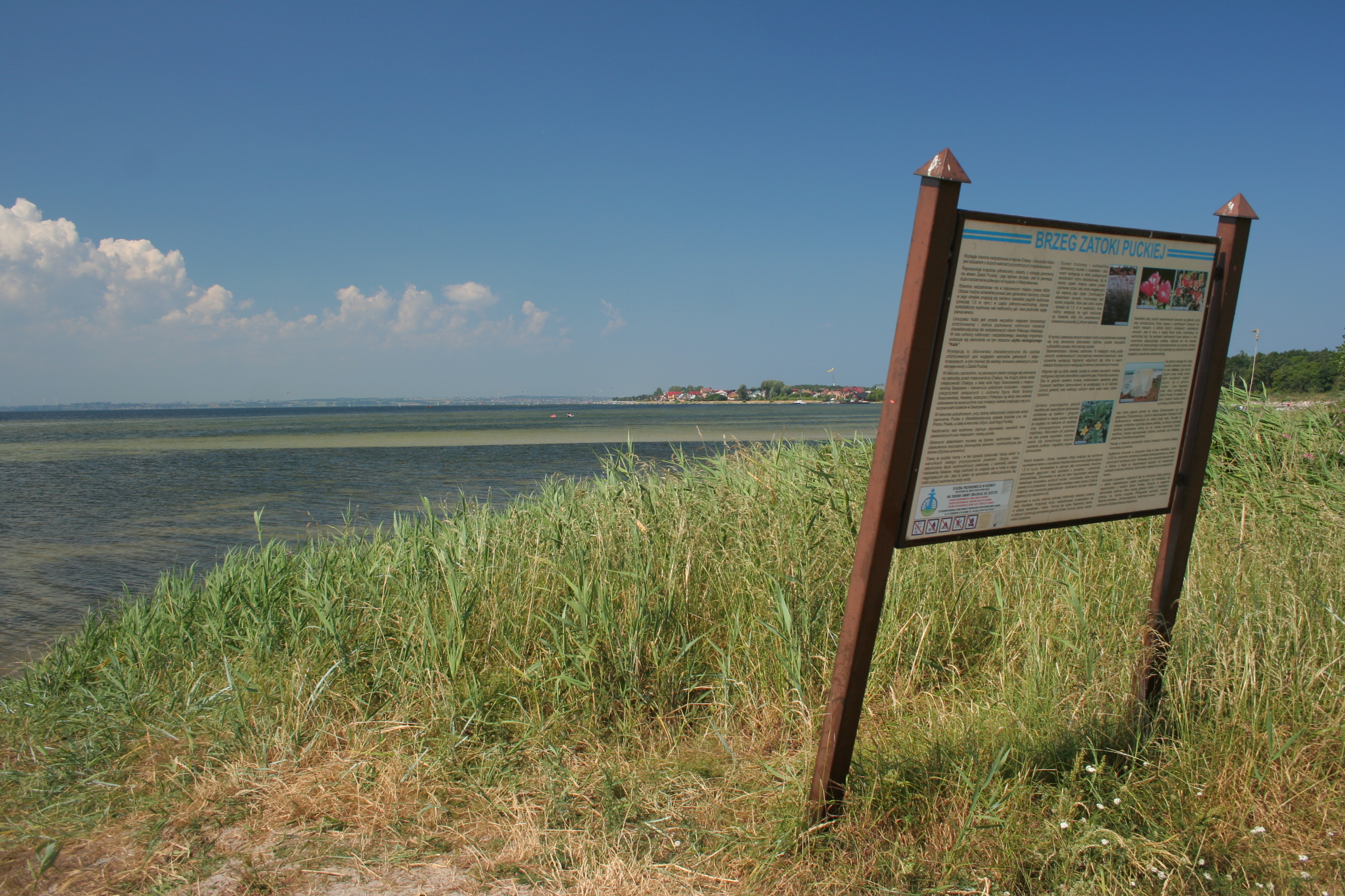 Uroczysko Każa.